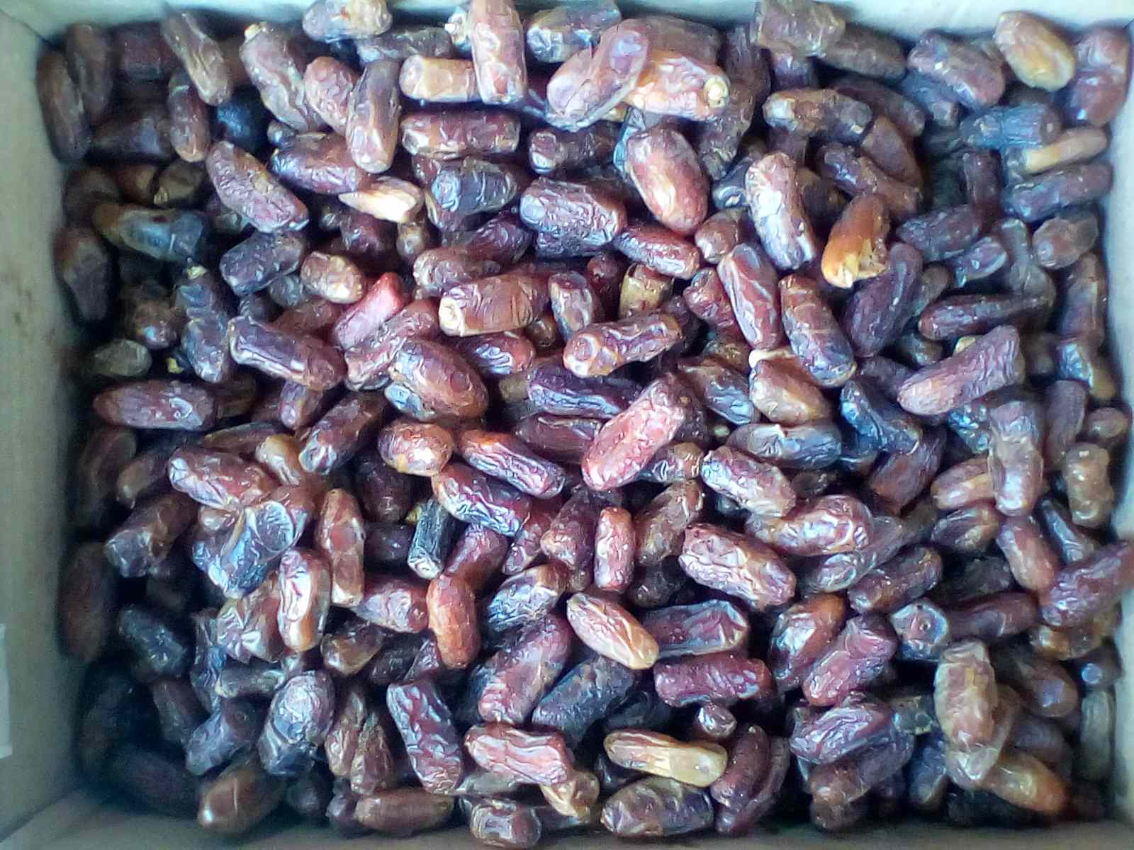 خرمای پیارم از نوع خرماهای نیمه خشک است و دیررس است و در گروه خرماهای نیمه خشک قرار دارد.